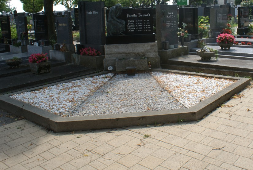 Grab Alfred Sramek-Stadtfriedhof Mistelbach